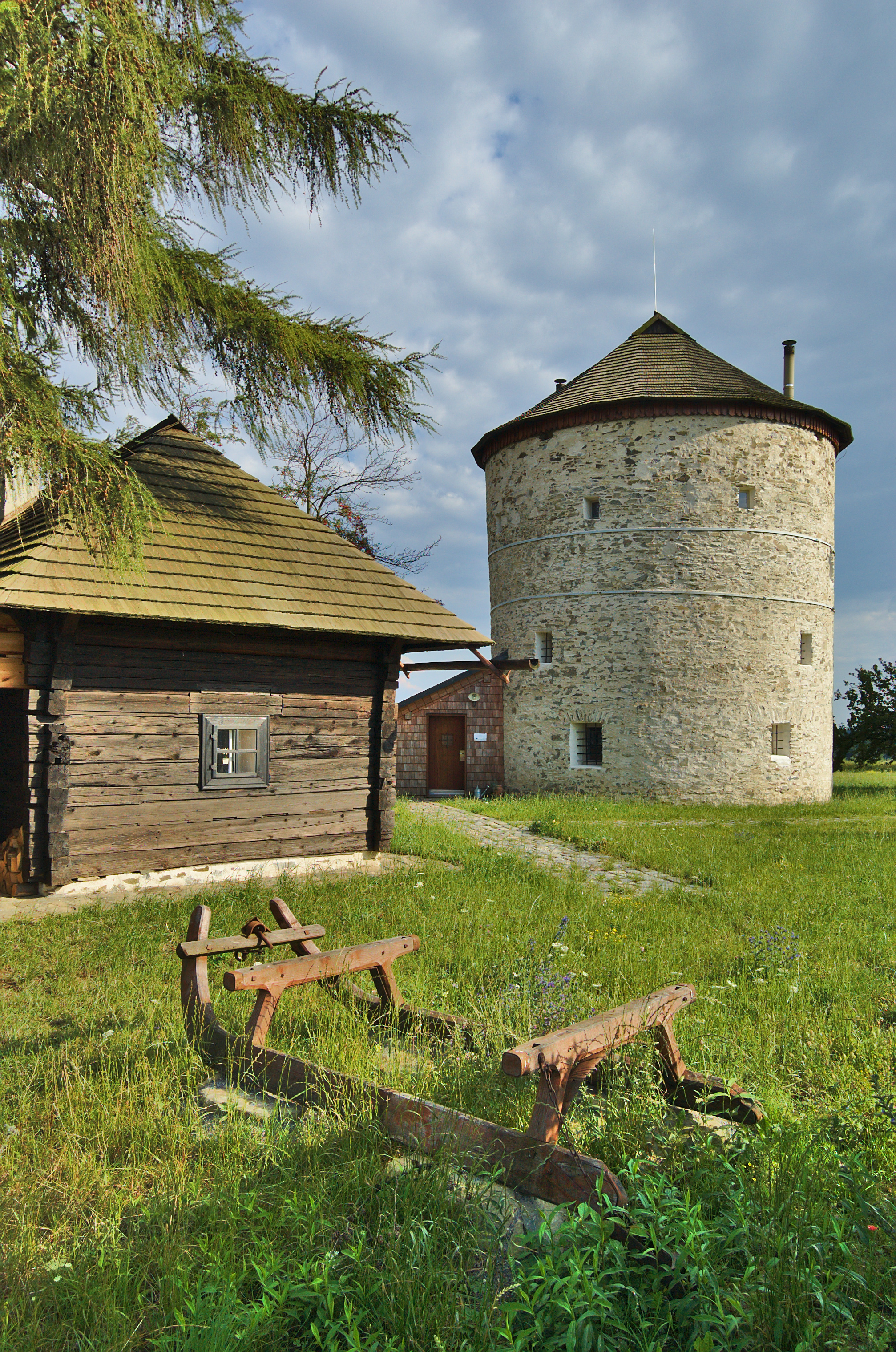 Větrný mlýn, Němčice, okres Blansko